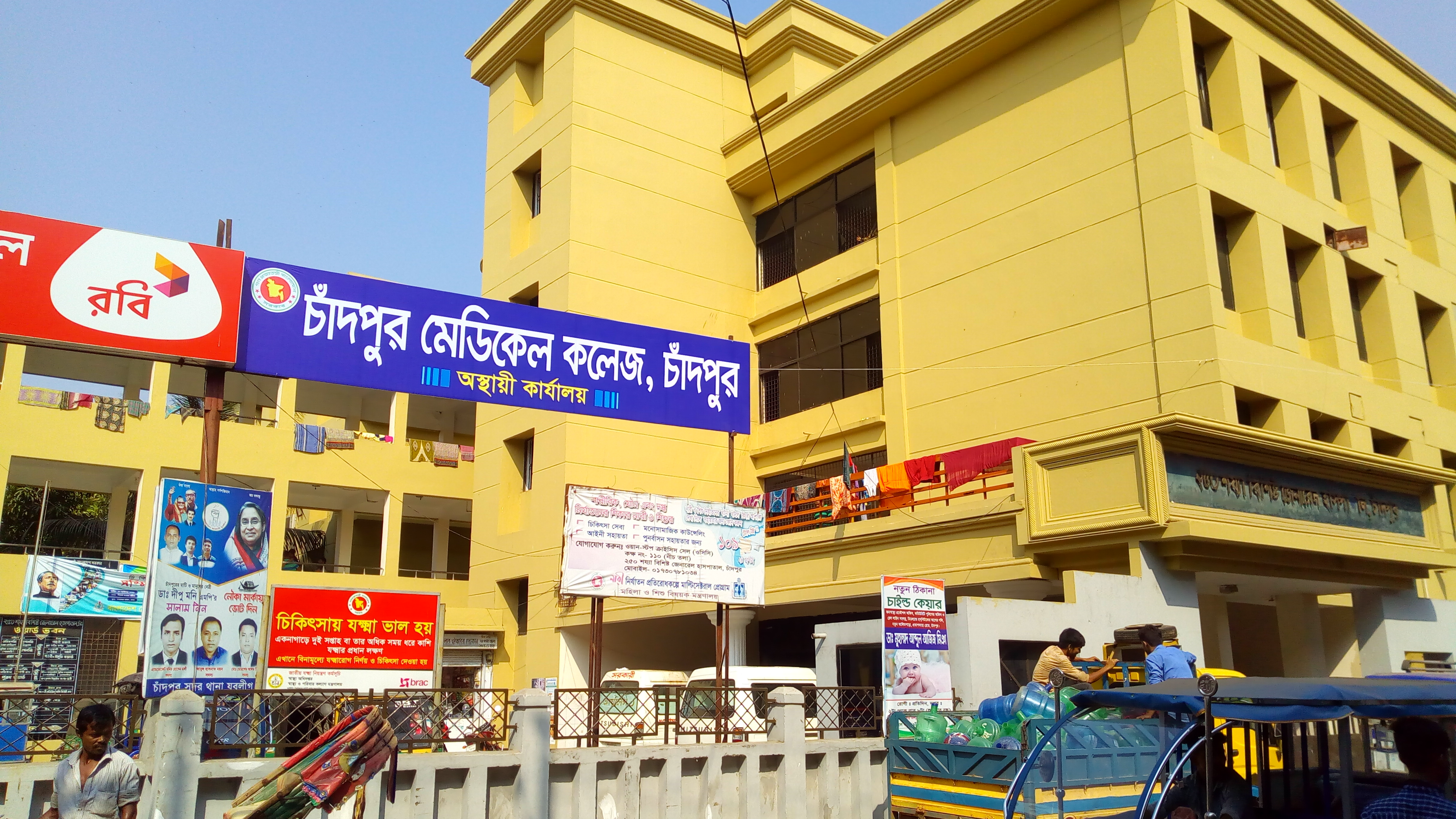 চাঁদপুর মেডিক্যাল কলেজের একাডেমিক ভবন ও অস্থায়ী কার্যালয়